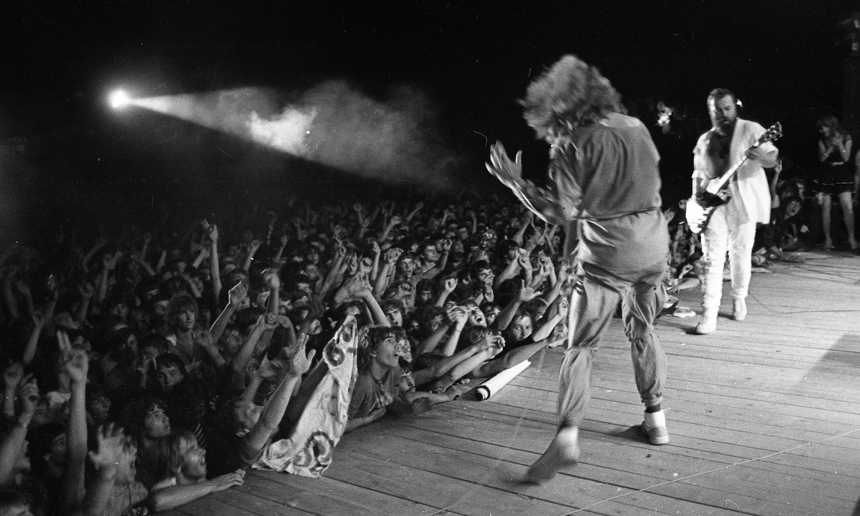 Népkerti pálya, Jubileumi Rockfesztivál, Kóbor János, Molnár György, Omega együttes. Location: Hungary Tags: beat era, stage, musical instrument, guitar, audience Title: Népkerti pálya, Jubileumi Rockfesztivál, Kóbor János, Molnár György, Omega együttes.